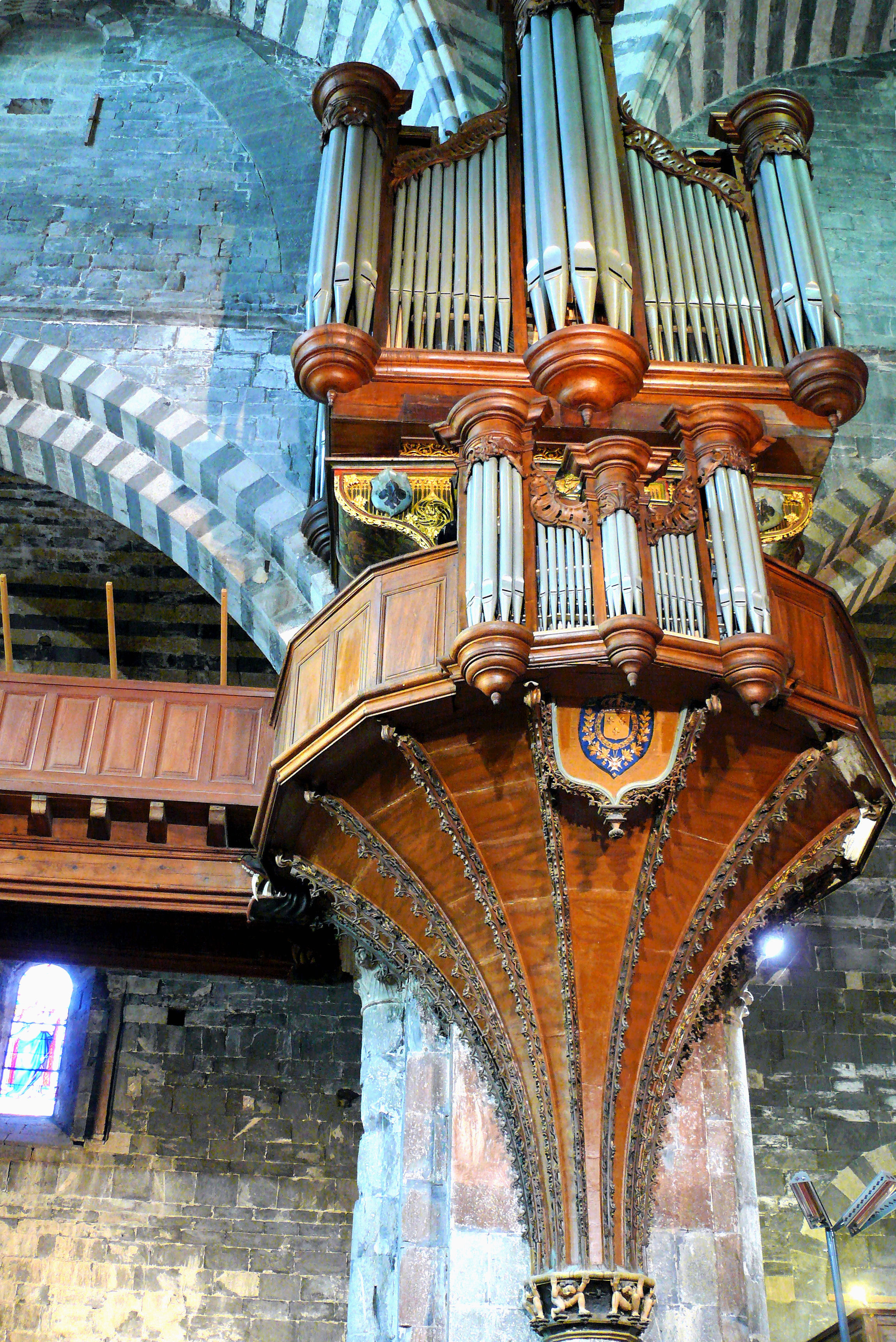 Embrun - Cathédrale Notre-Dame du Réal - Grand orgue